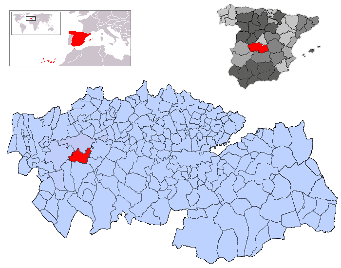 Las Herencias en la provincia de Toledo